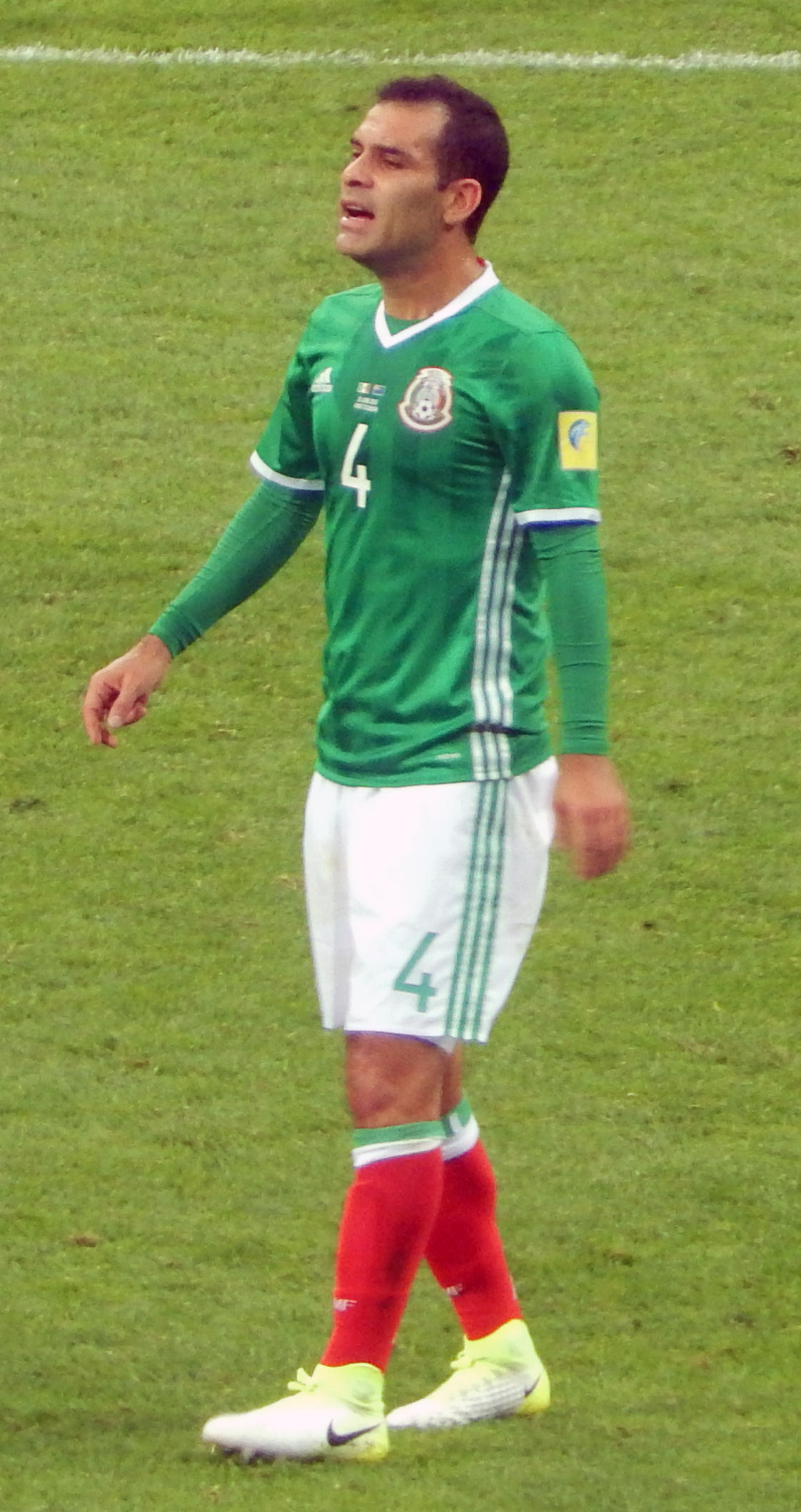 Рафаэль Маркес в матче против сборной Новой Зеландии